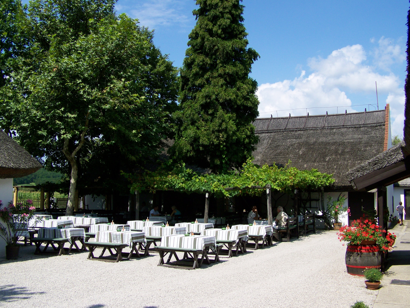 Gyöngyösi csárda (Rezi, Karmacsi útnál)